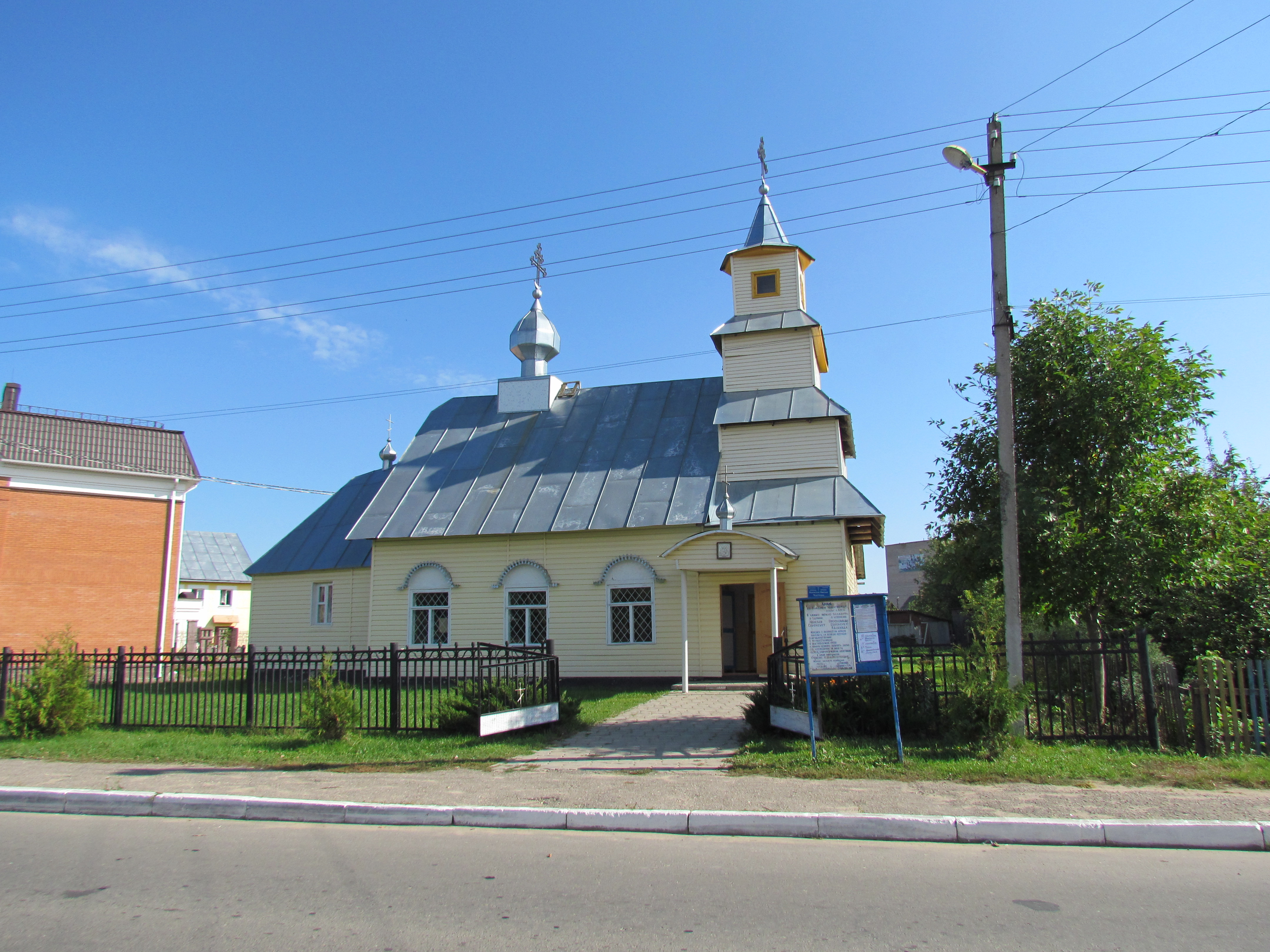 Беларуская (тарашкевіца): Дуброўна